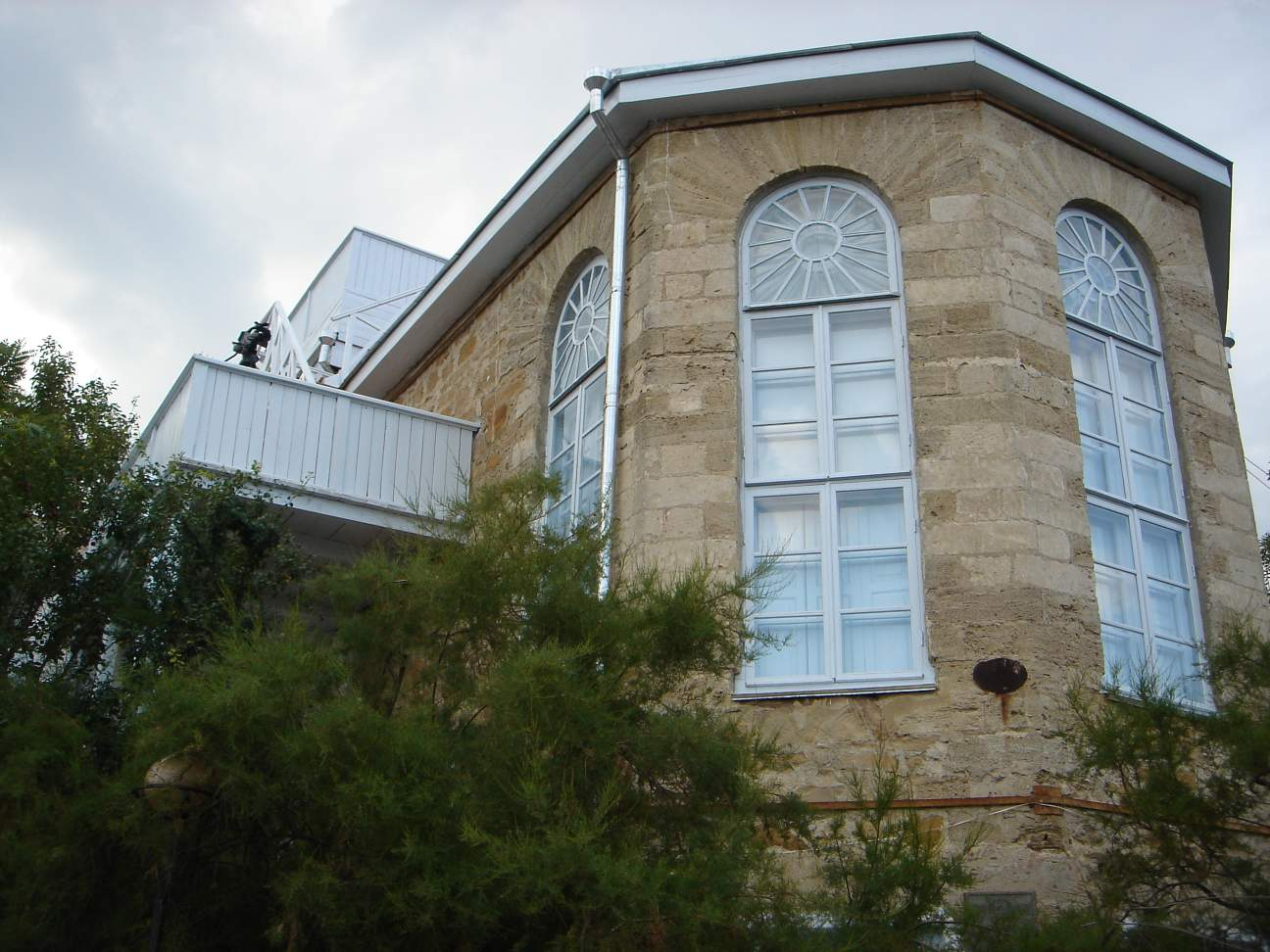 Maksimilian Voloshin's house-museum, Koktebel